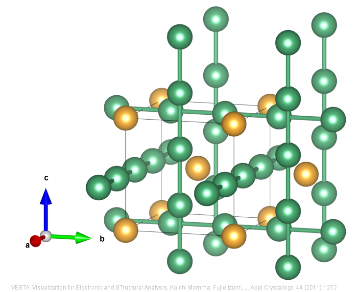 Schematische Darstellung der A15-Struktur von A3B-Phasen, auch Cr3Si- oder β-W-Struktur genannt. Die A-Atome sind in zueinander orthogonalen Reihen angeordnet. Die eingezeichneten „Stäbe“ dienen zur Veranschaulichung und Verdeutlichung dieser Anordnung, sie sollen keine besonderen Bindungen symbolisieren. Bild erstellt mit der Software VESTA, Visualization for Electronic and STructural Analysis. Siehe Koichi Momma and Fujio Izumi, “VESTA 3 for three-dimensional visualization of crystal, volumetric and morphology data,” J. Appl. Crystallogr., 44, 1272-1276 (2011)